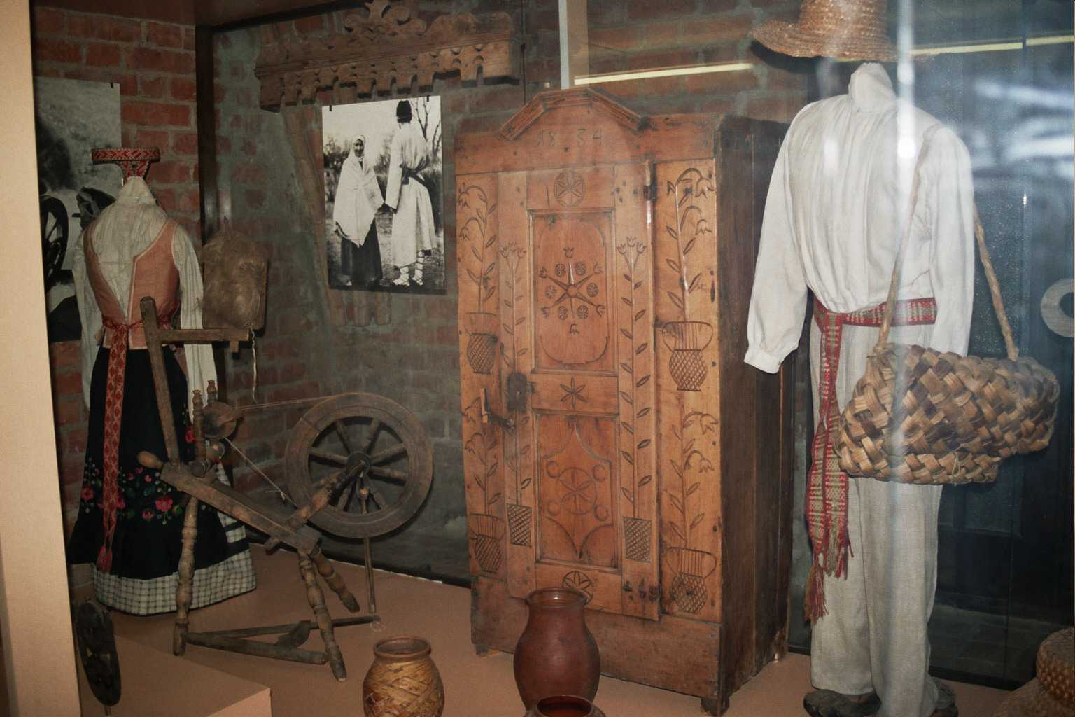 Kultura litova tradicio en muzeo de Trakai.